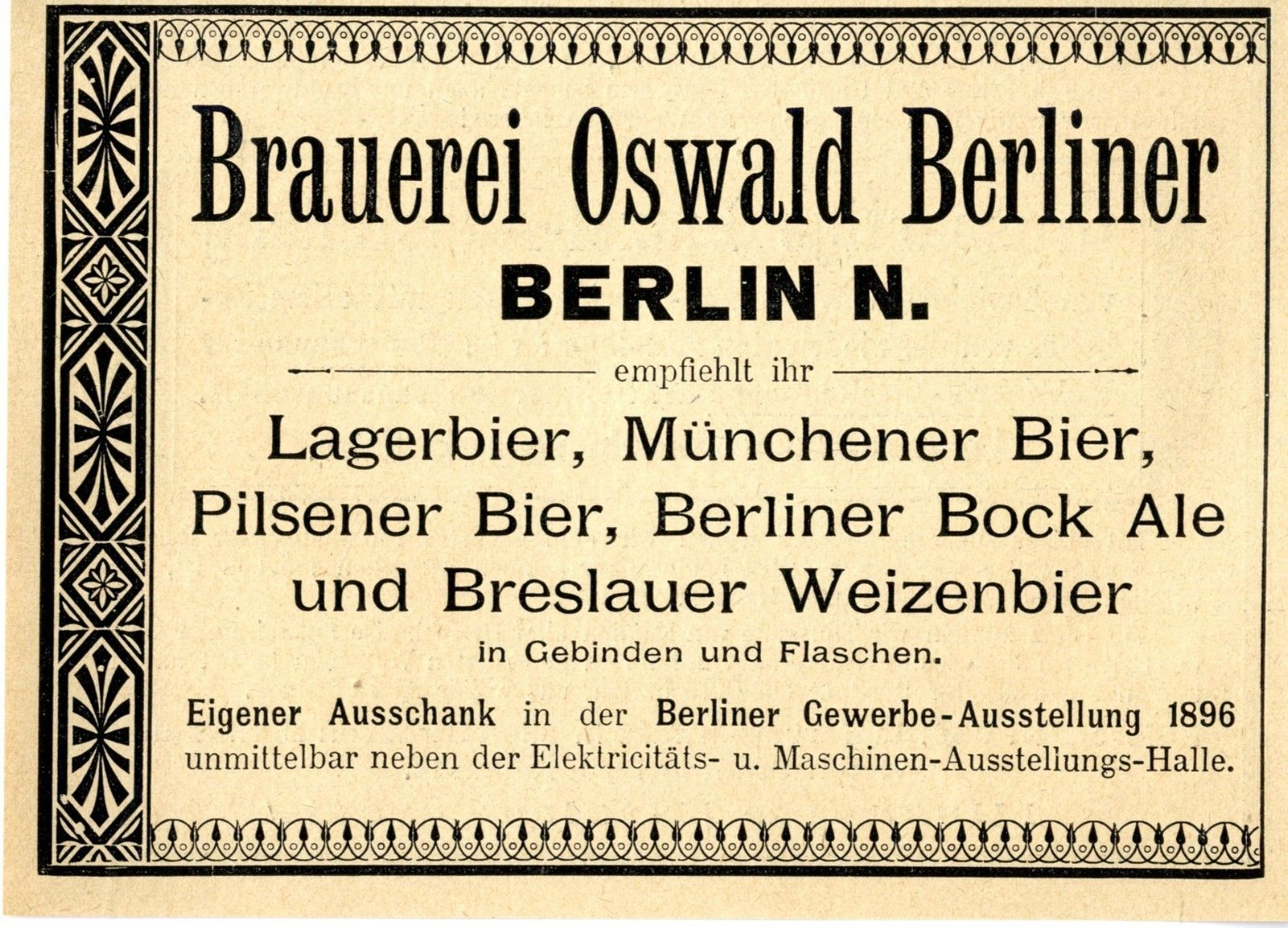 Werbung für die Brauerei Oswald Berliner anläßlich der Berliner Gewerbe-Ausstellung 1896